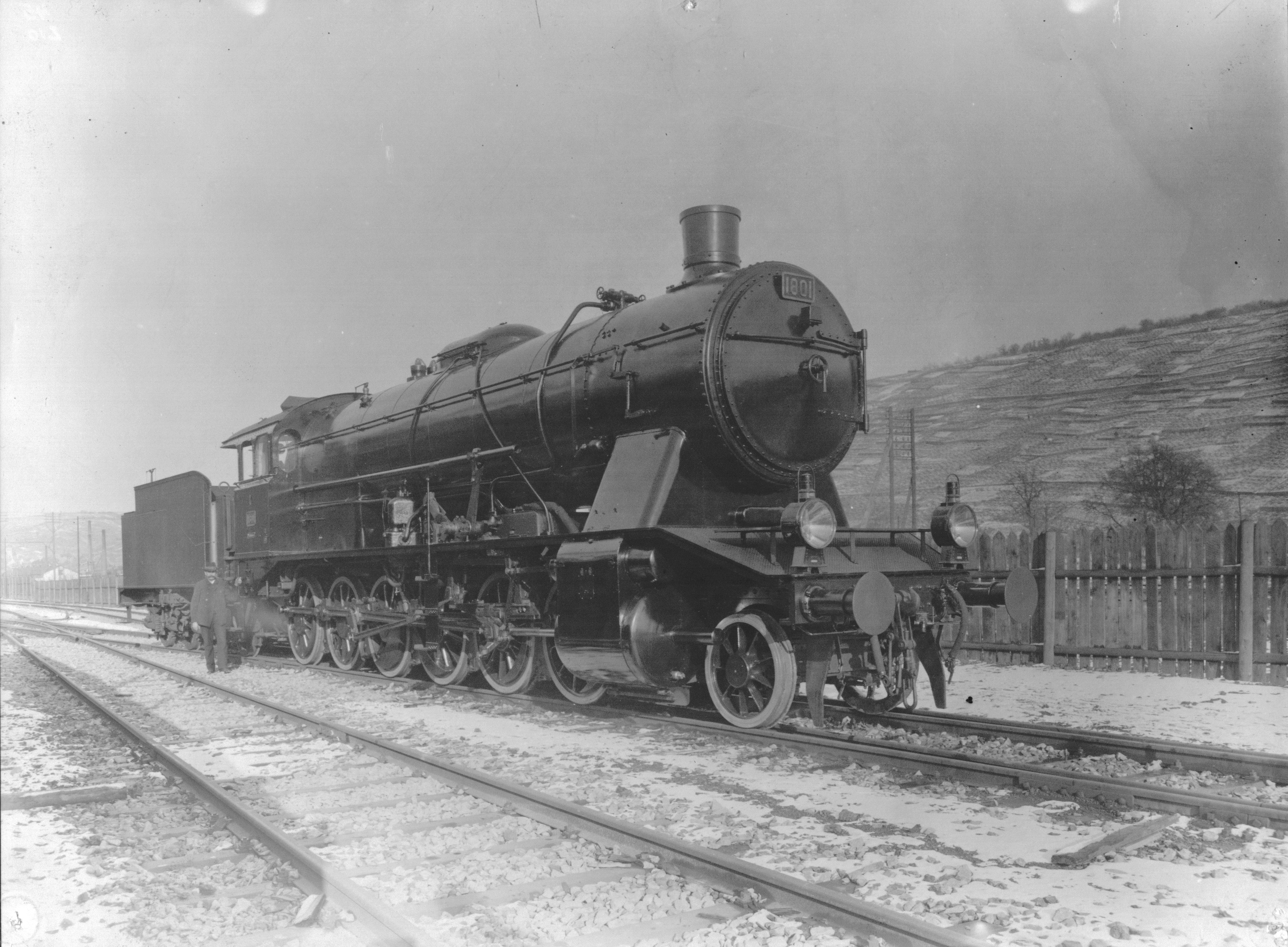 Dampflokomotive Württembergische K.